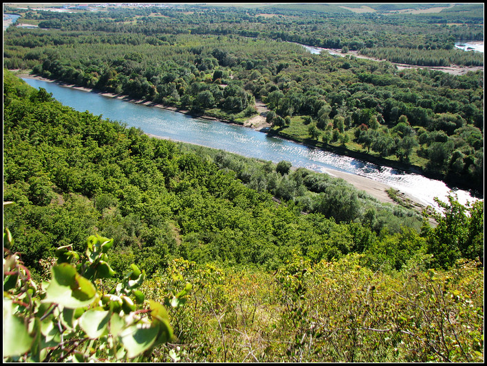 远眺卧牛河